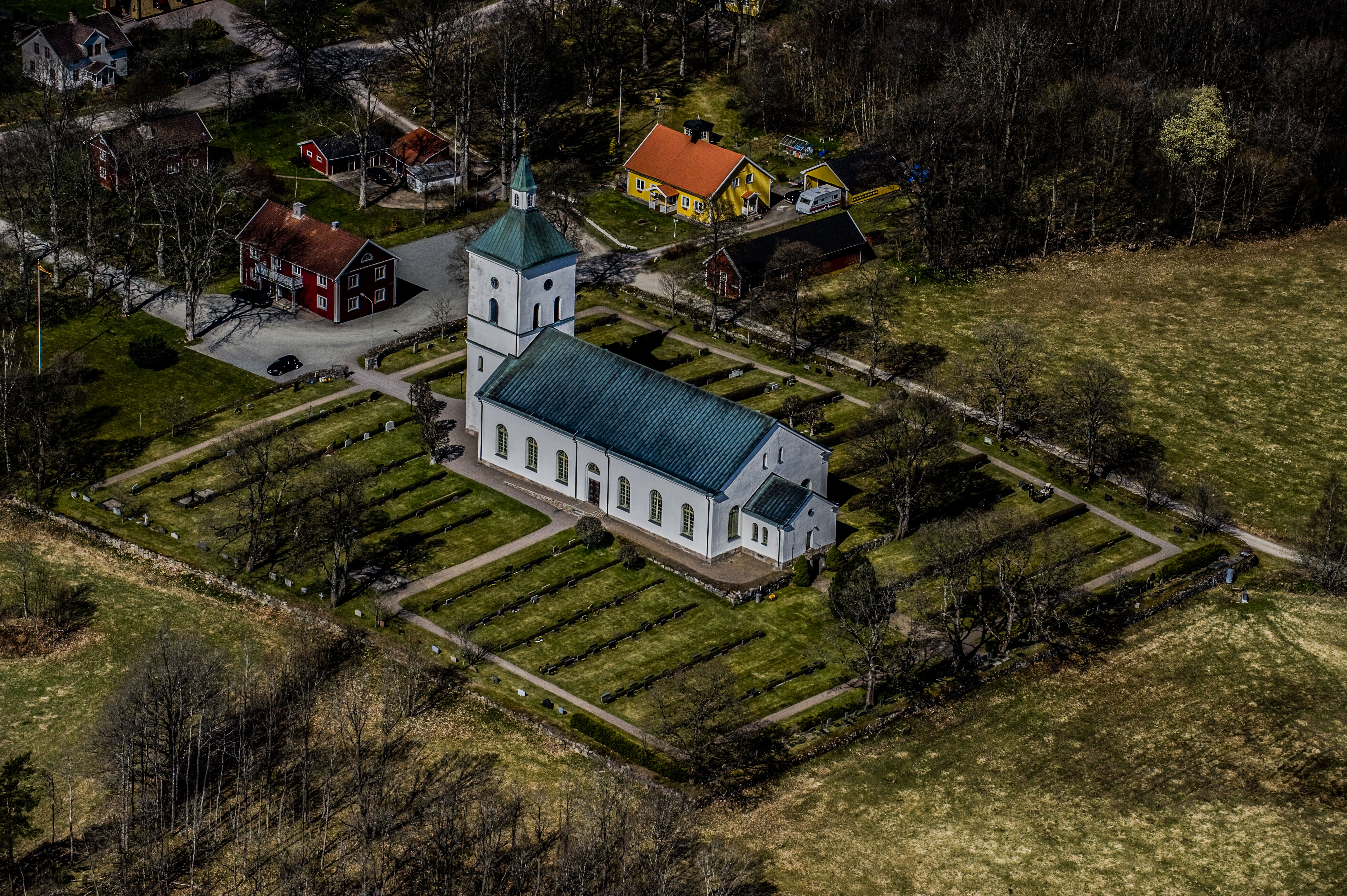 Hultsjö kyrka